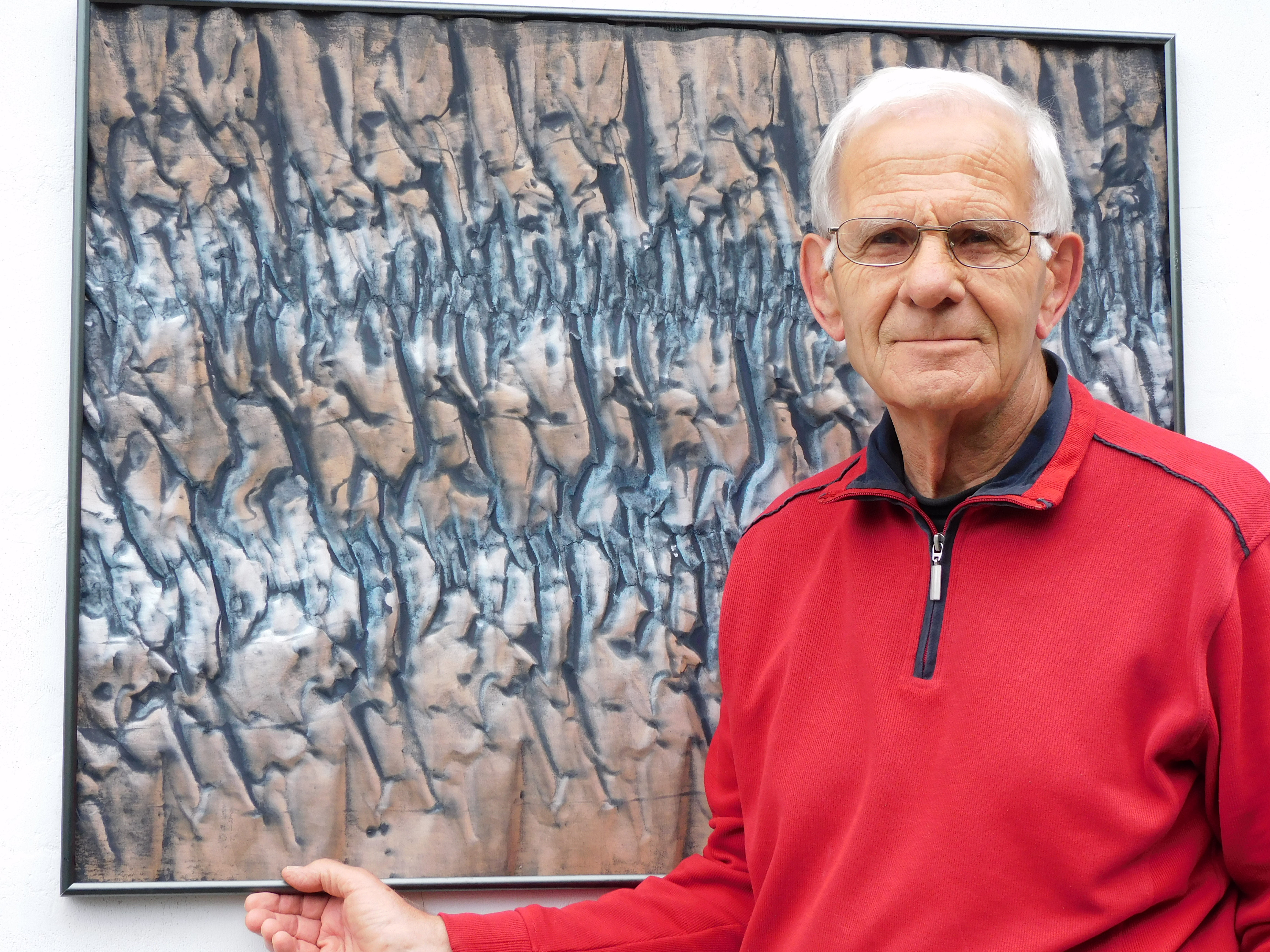 Hans-Dieter Ahlert 2020